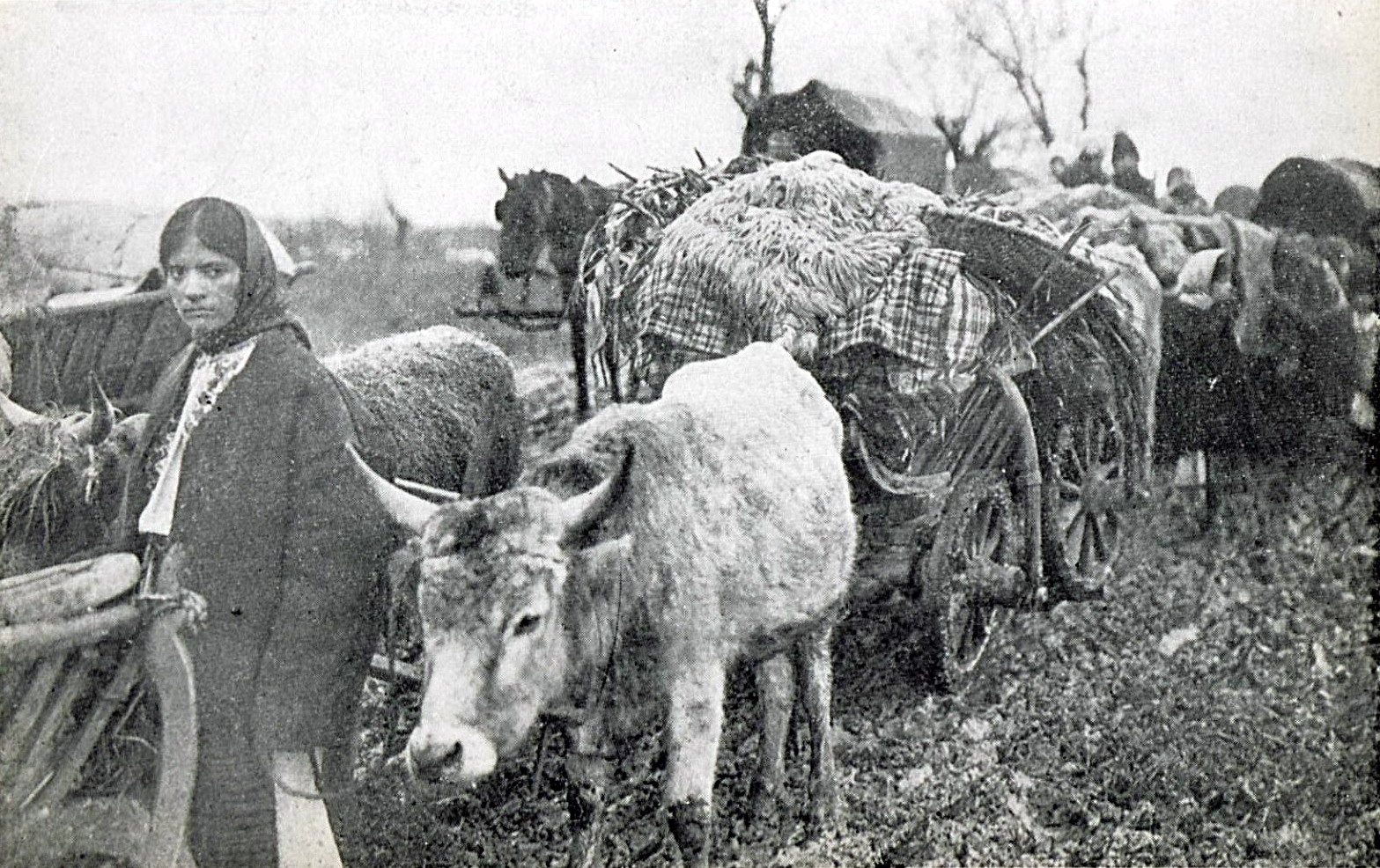 1916 - Album foto - Refugiati romani